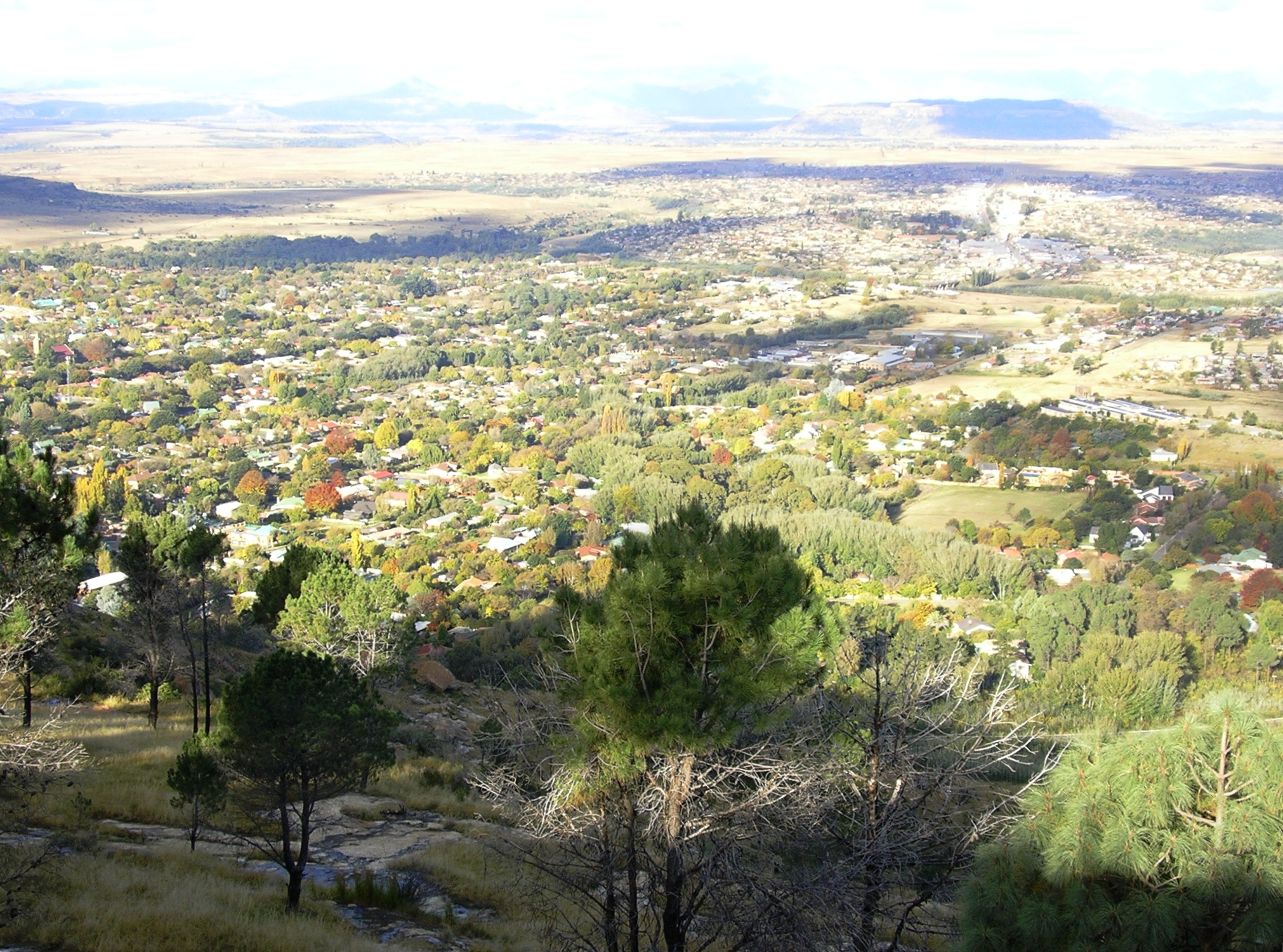 Foto van Ficksburg geneem vanaf Imperani Berg. Die Caledon Rivier en Lesotho kan Langs Ficksburg gesien word, met die Maluti Berge in die agtergrond.